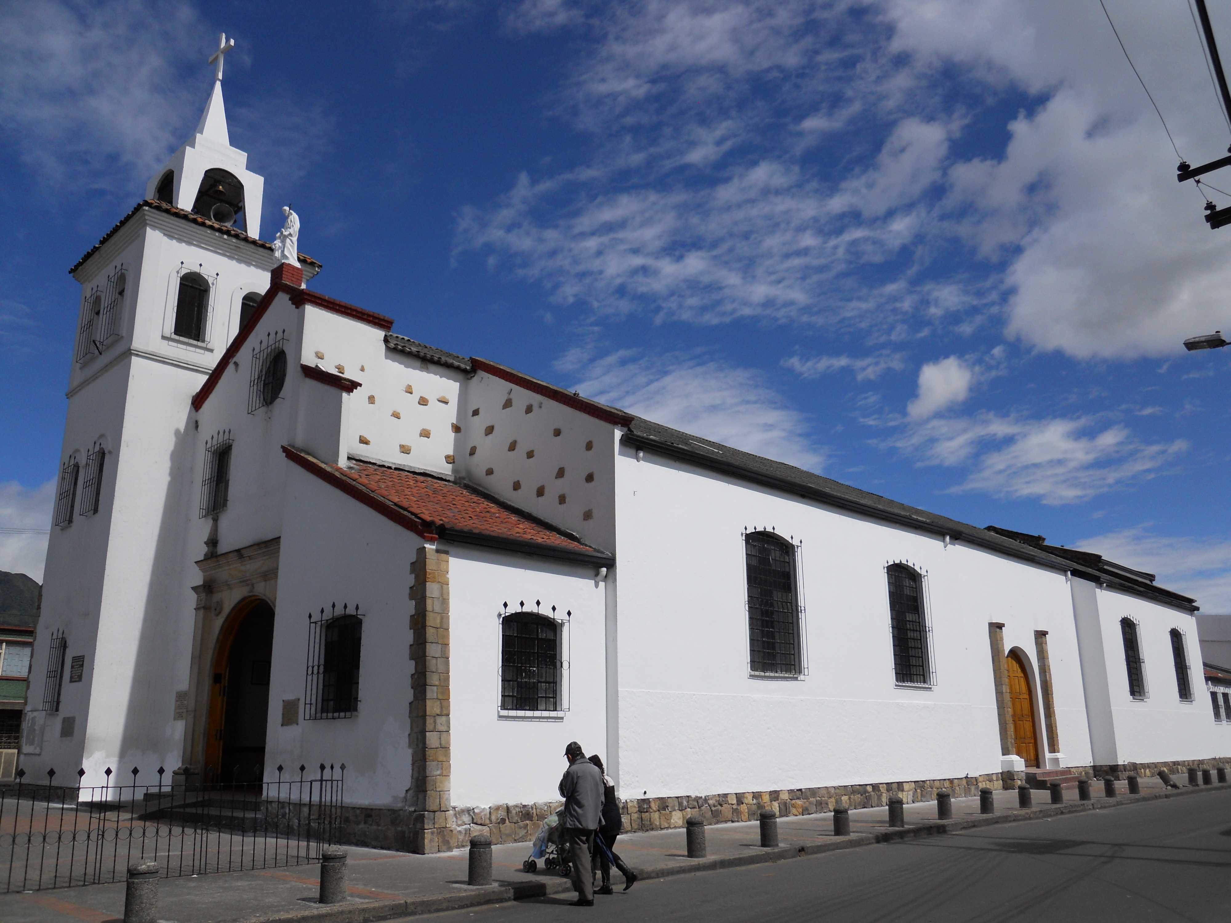 Iglesia de San José Obrero en Bogotá, calle 26 sur con carrera 13, barrio San José Sur, localidad de rafael Uribe Uribe.